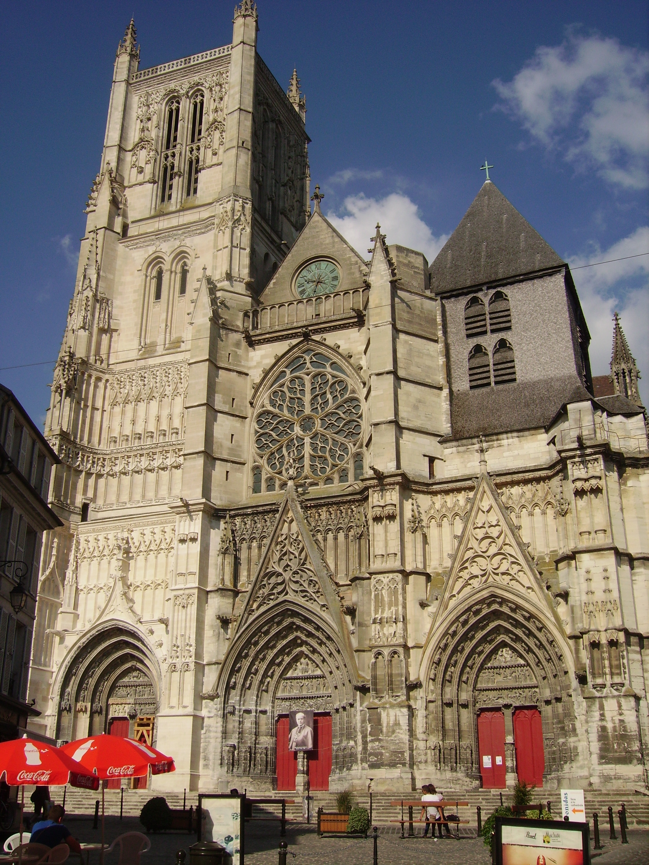 Meaux(Seine-et-Marne):Façade de la cathédrale Saint-Étienne